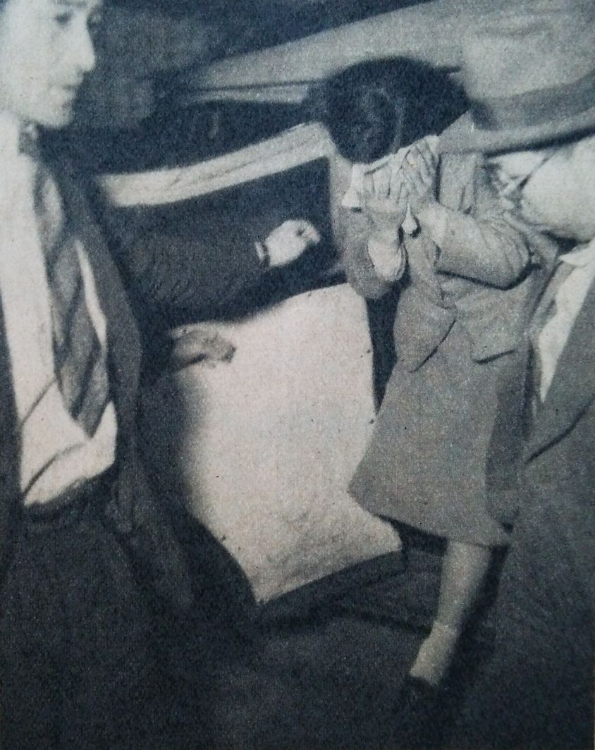 荒川放水路バラバラ殺人事件の犯人